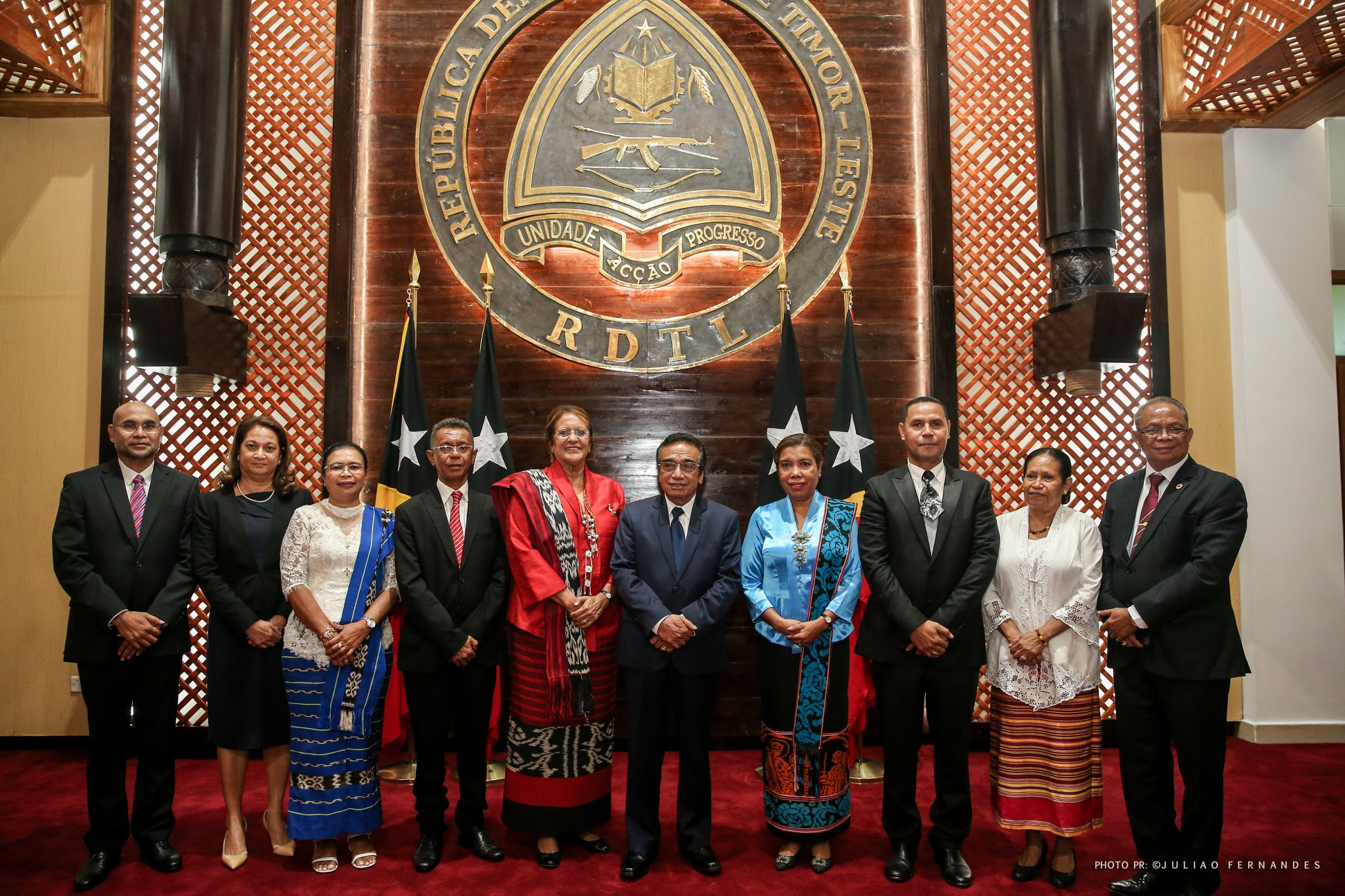 Vereidigung von neun neuen Botschaftern Osttimors durch Präsident Guterres im Präsidentenpalast